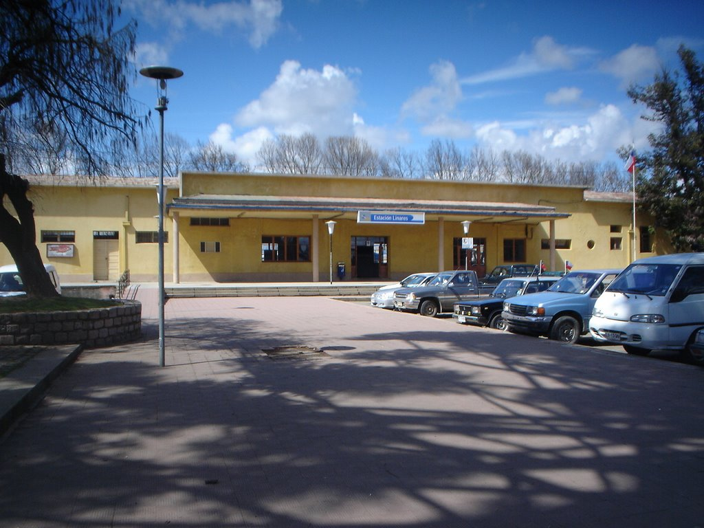 Estación de Ferrocarriles en la ciudad de Linares, Chile. 2019.